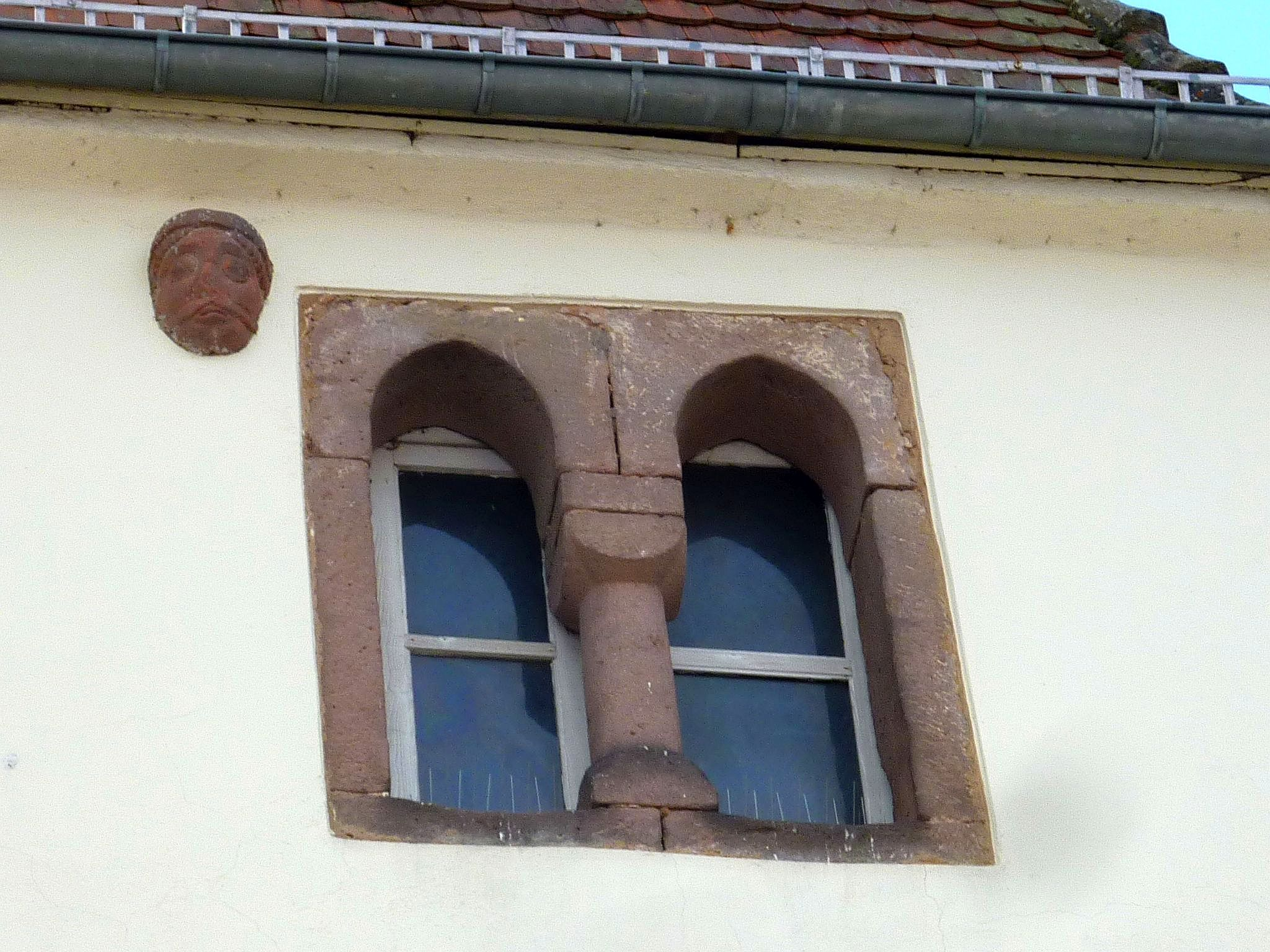 Église Saint-Nabor de Saint-Nabor